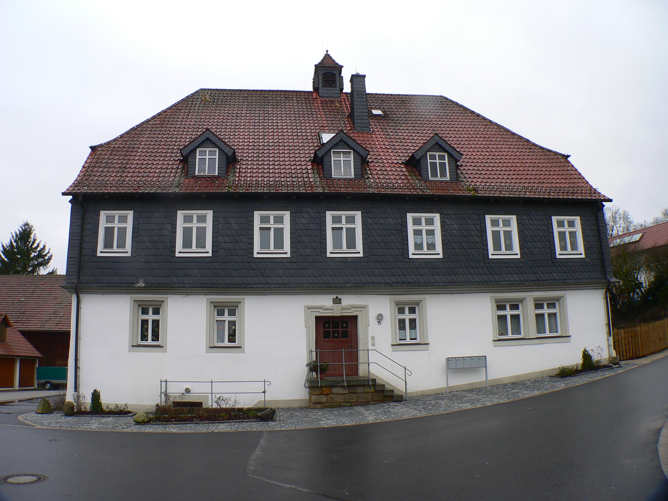 Schloss Tüschnitz in Küps, Bayern, Regierungsbezirk Oberfranken, Landkreis Kronach – Ökonomiehaus aus 1822